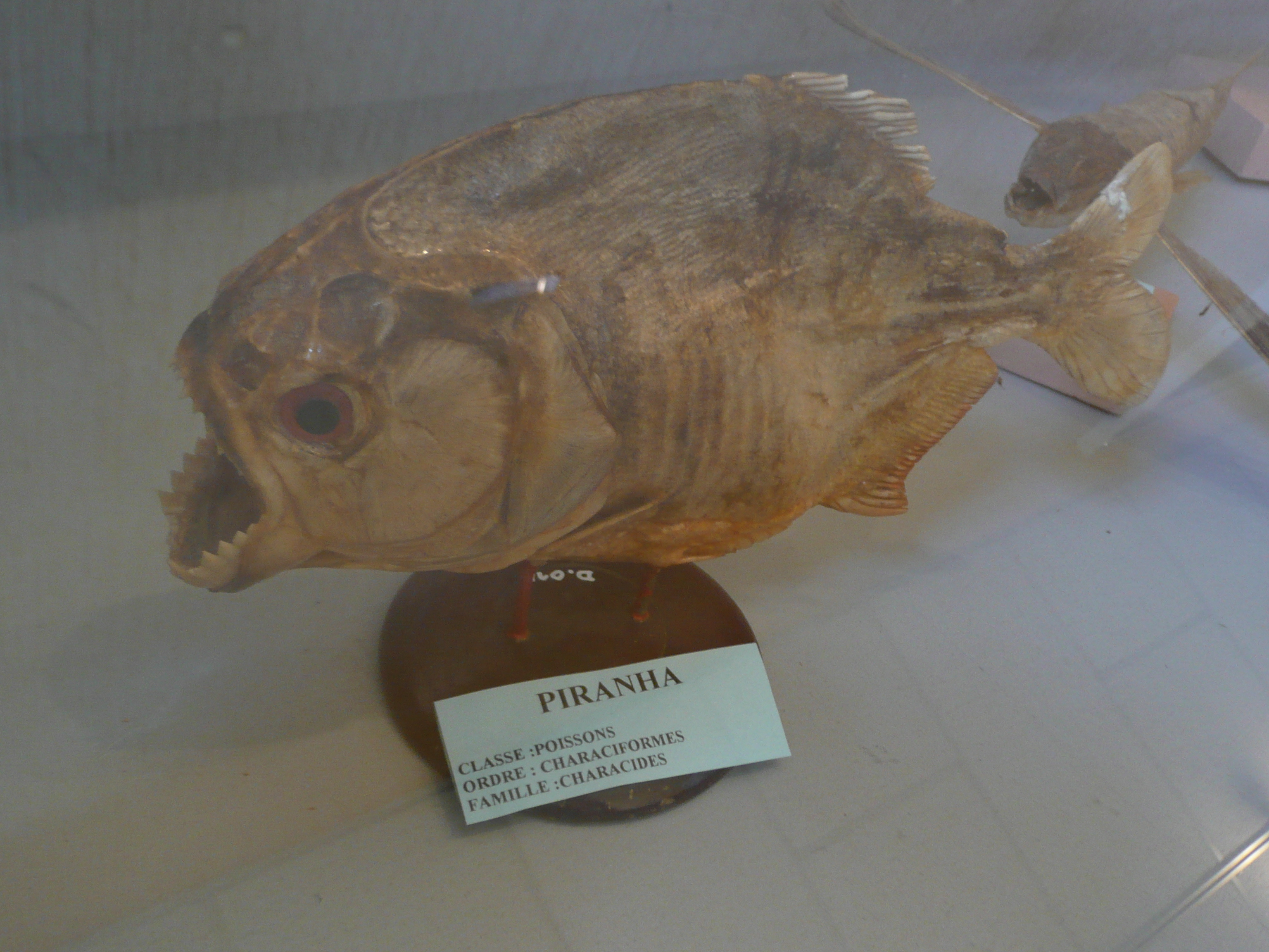 Piranha - musée Philadelphe Thomas - à Gaillac (France)